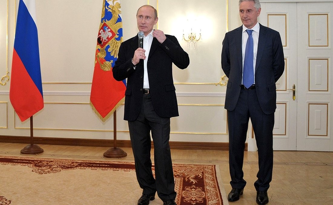 Владимир Путин на встрече со сборной России по хоккею. С главным тренером Зинэтулой Билялетдиновым